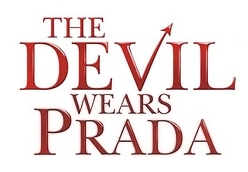 logotipo de la pelicula "the devil wears prada"